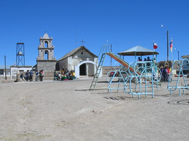 Iglesia y plaza de Cancosa, region de Tarapacá, Chile